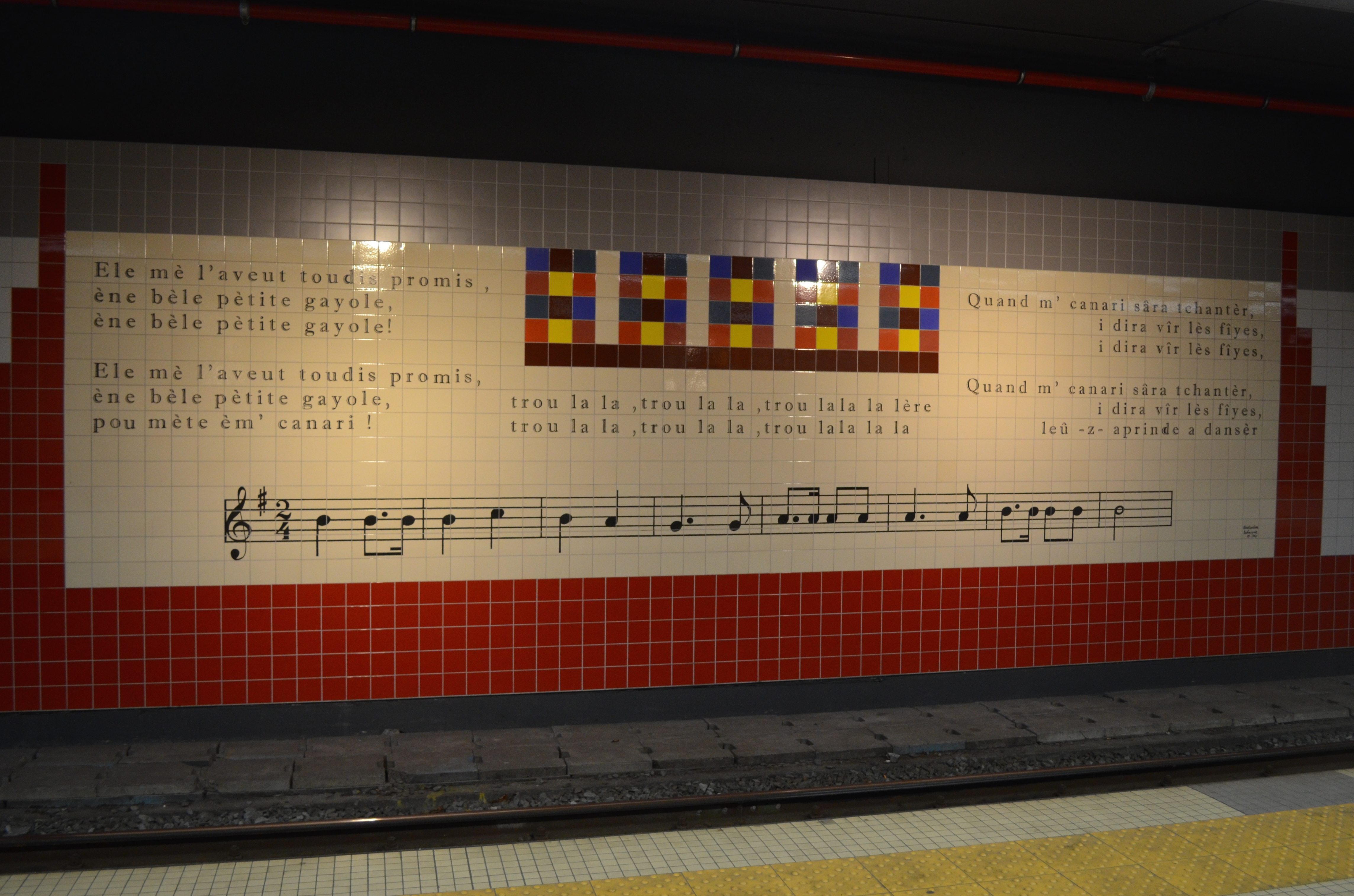 La pètite gayole - Décoration de la station Gilly du métro léger de Charleroi.